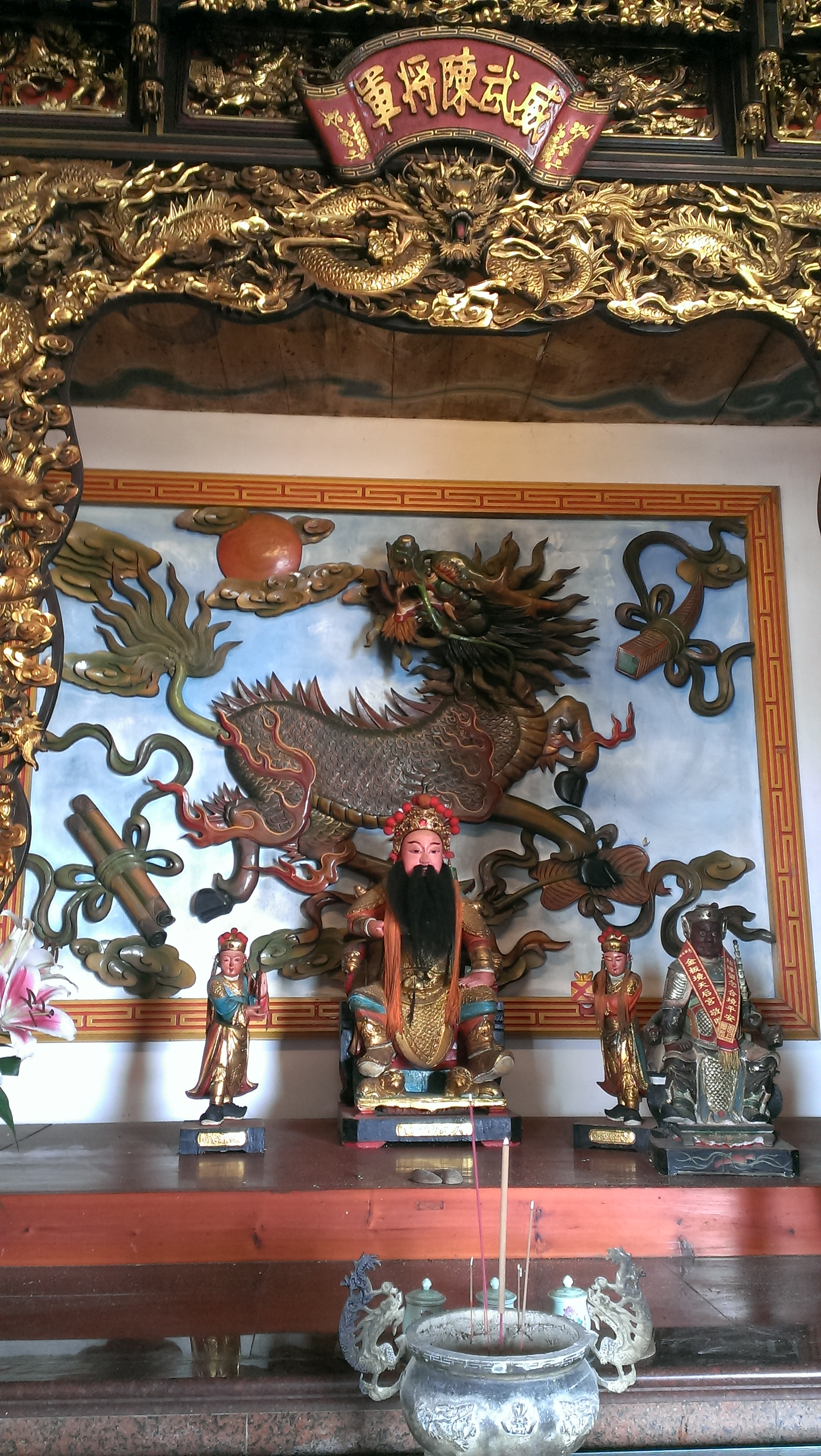 馬祖南竿鄉馬祖村(馬港)天后宮內之威武陳將軍神龕